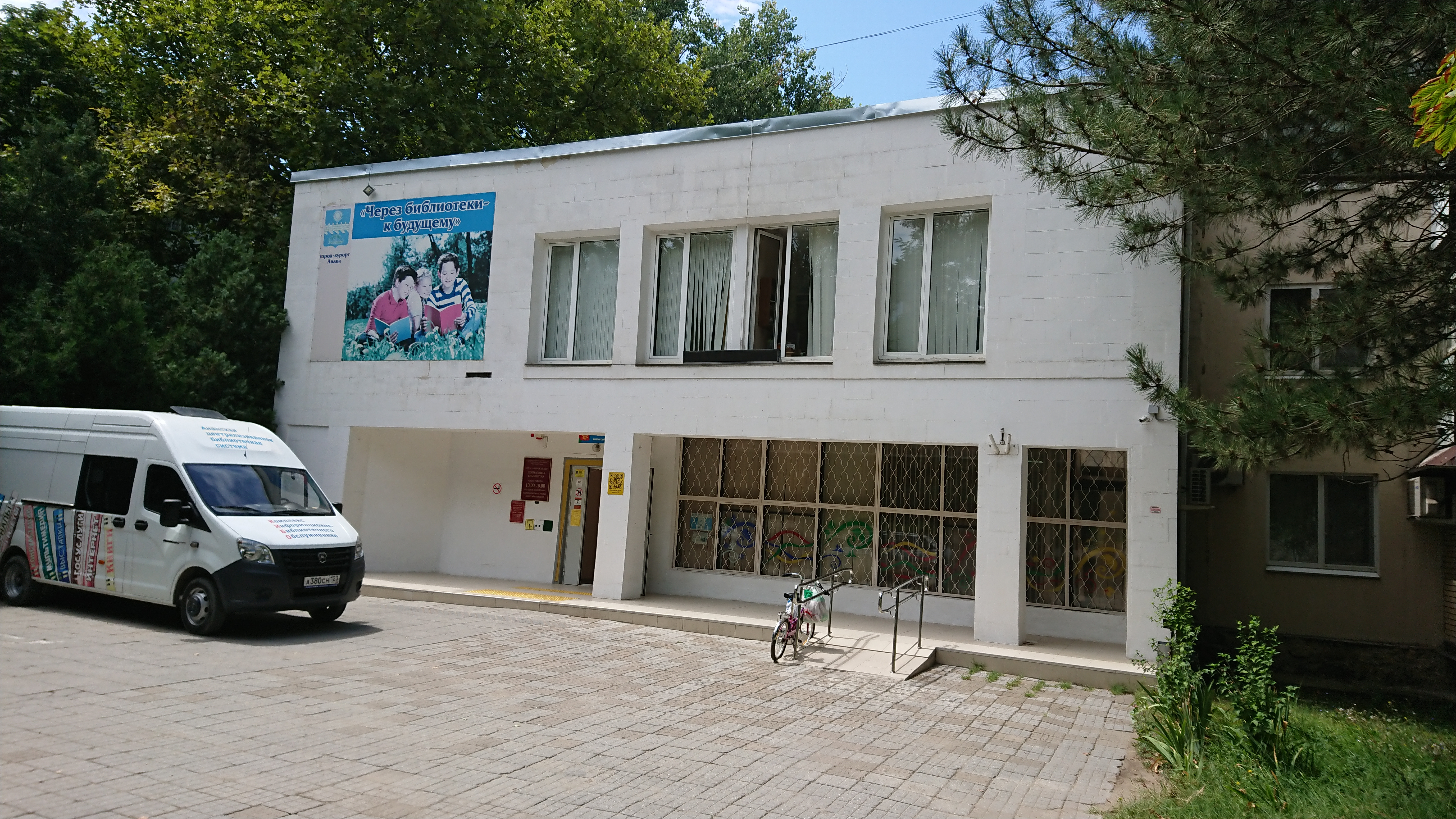 Презентация проекта "Открытое наследие" в Центральной Библиотеке Анапы